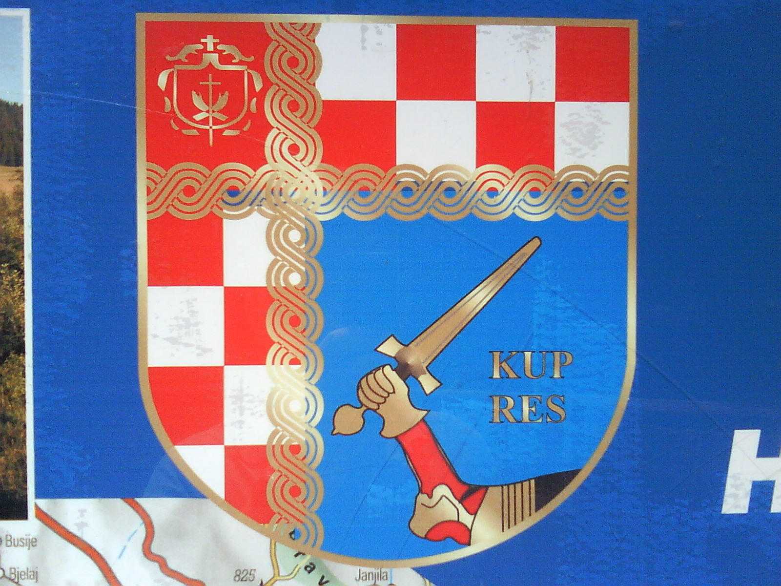 grb Kupresa na ploči